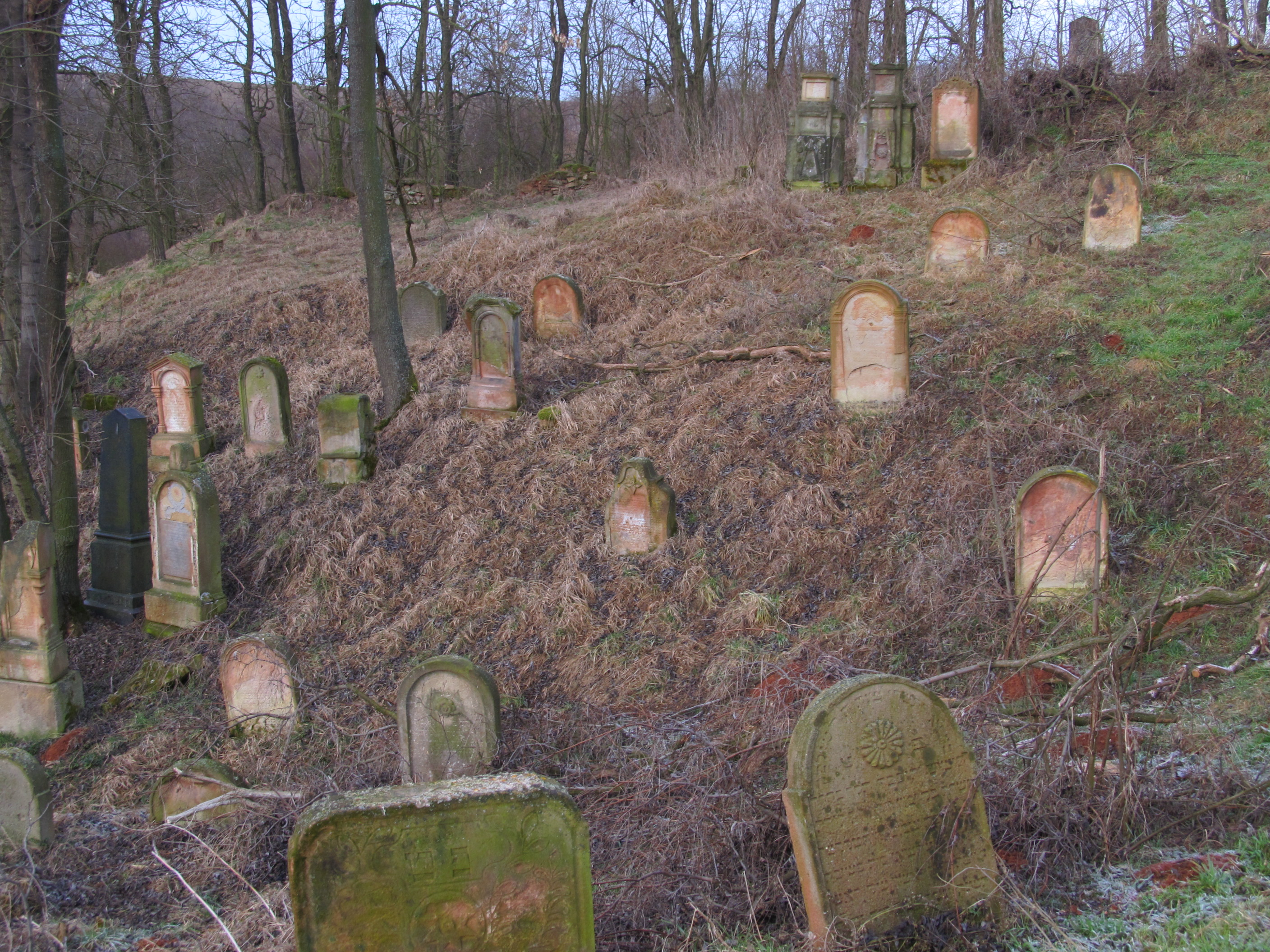 Drahonice - židovský hřbitov